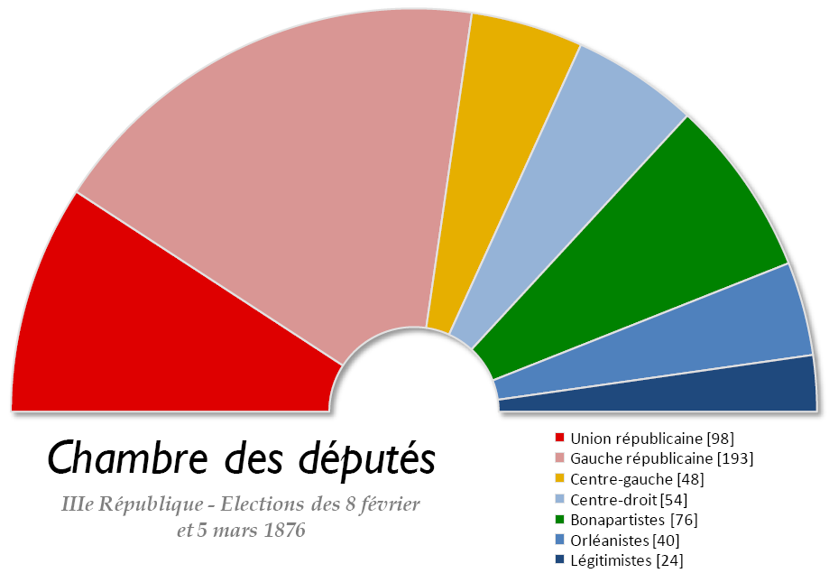 Chambre des députés française issue des élections législatives de 1876